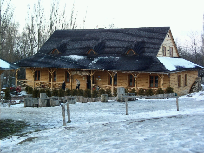 Łódź - Ruda Pabianicka - Rudzka Góra - Restauracja "Bacówka u Józka" Autor: Marek Szuszkiewicz 2003